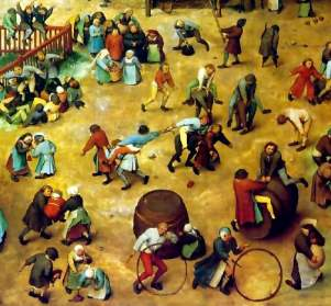 of uploader heeft geen info achtergelaten of deze is bij een automated conversion verloren gegaan. Gezien de ouderdom van het schilderij vermoed ik dat de afbeelding vrij van auteursrechten is.